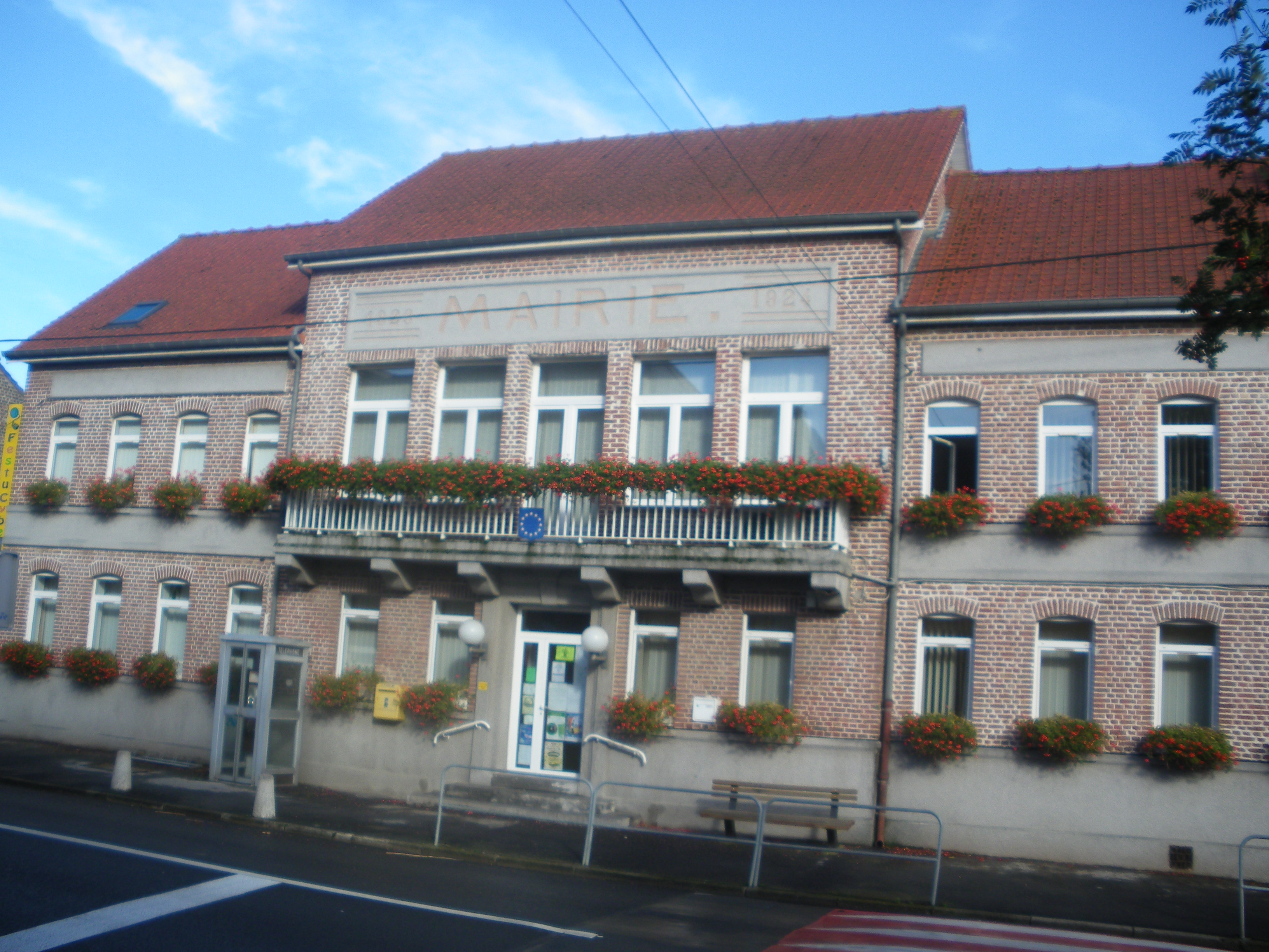 Vue de la mairie de Festubert.